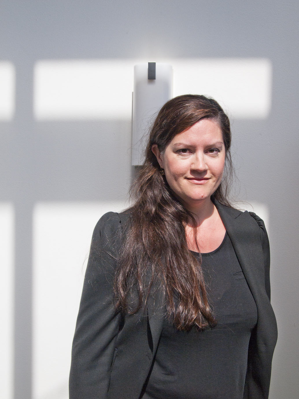 Regissören Anna Novovic